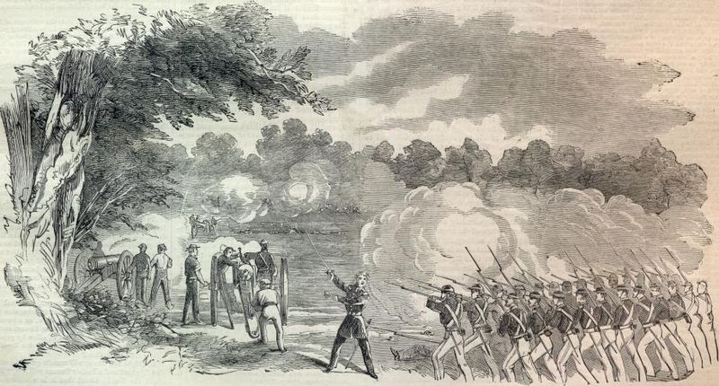 THE BATTLE OF BOONVILLE, MISSOURI.â€”